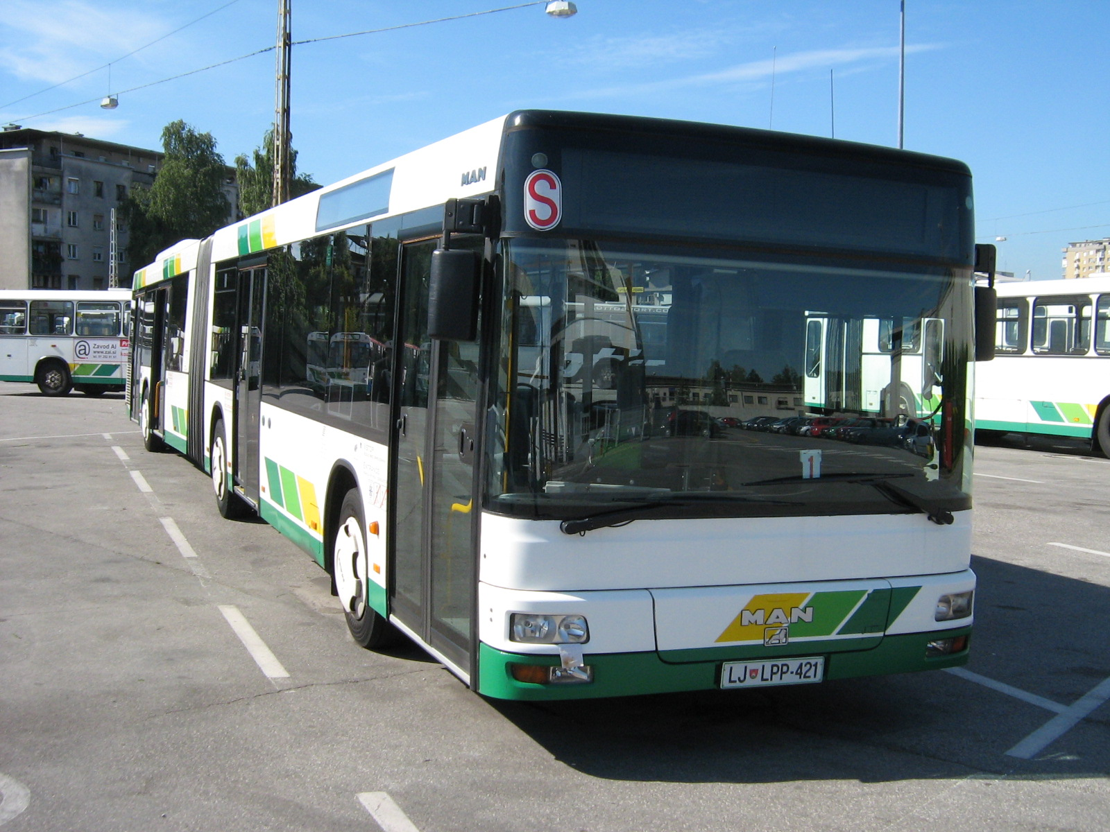 Avtobus MAN NG 313 v lasti Ljubljanskega potniškega prometa. Avtor: Uporabnik:BurekBuster